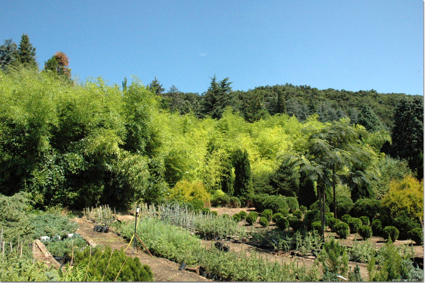 Folly Arborétum A Folly Arborétumot Badacsonyörsön mintegy száz éve hozta létre dr. Folly Gyula. A többnyire fenyőkből álló gyűjtemény a Kisörsi-hegy déli oldalában, a Balatonhoz közel található. Az arborétum ma három különböző korú növénypopulációt tartalmaz, ezeket a család három generációja telepítette.